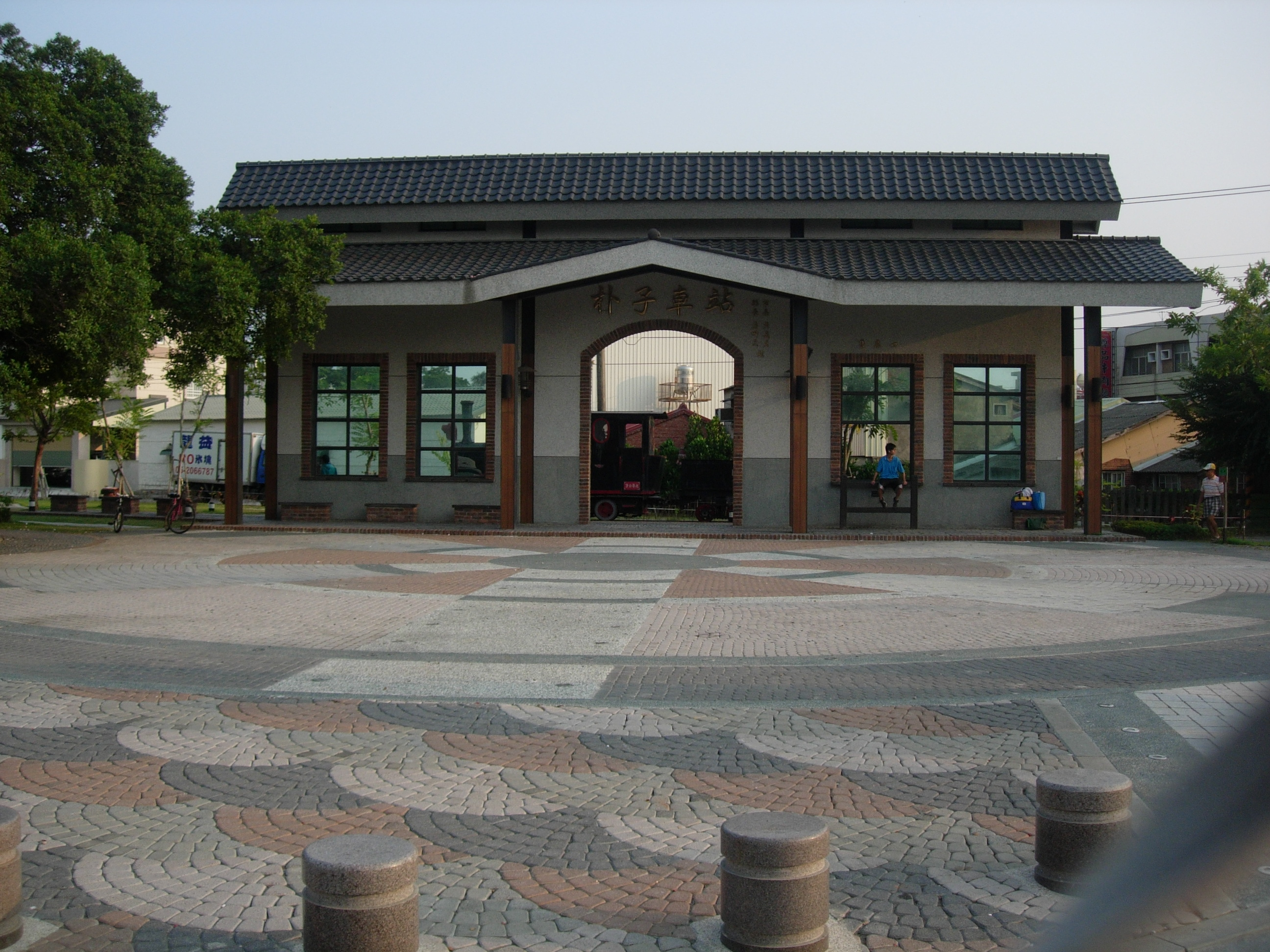 中文（台灣）: 朴子火車頭公園